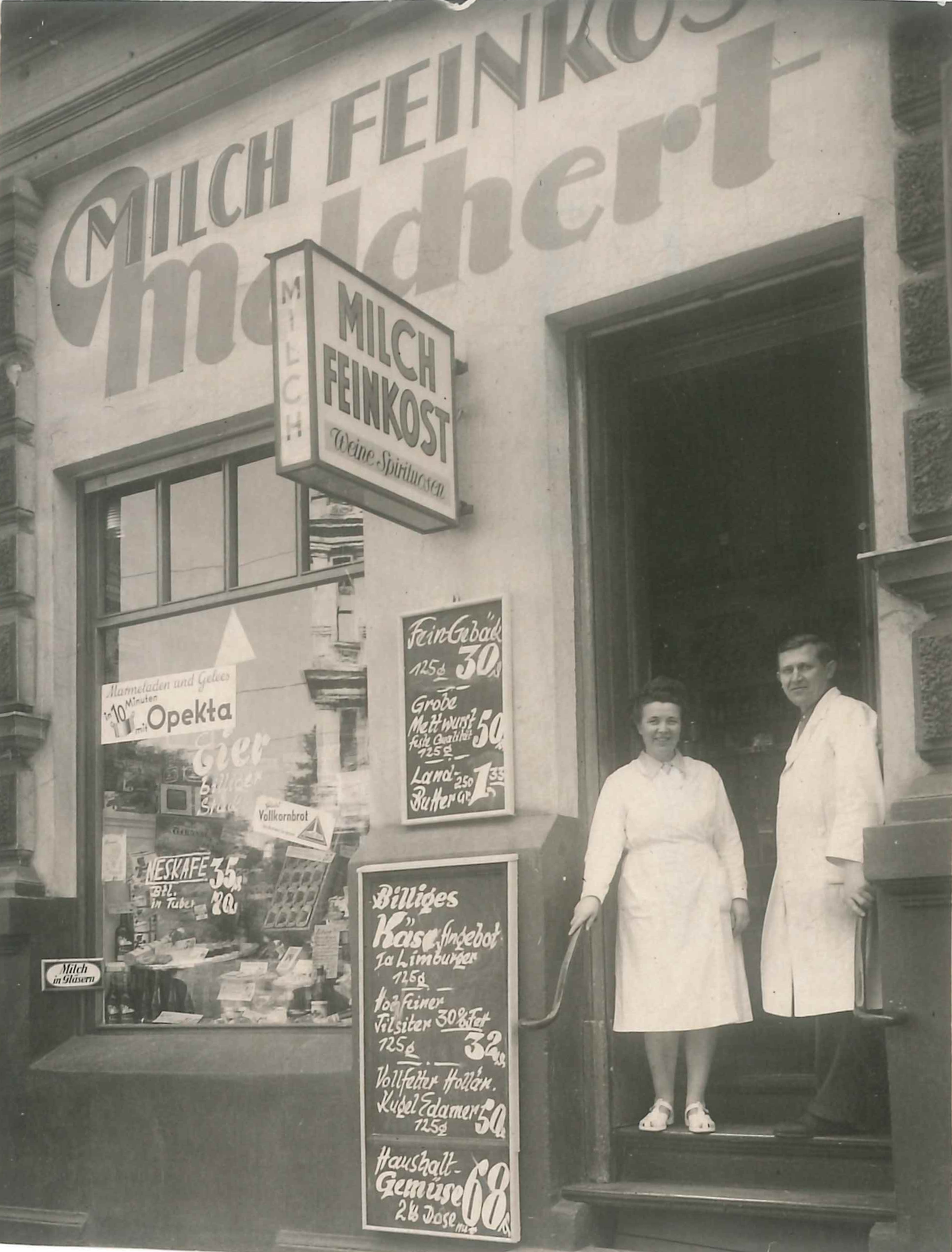 Tante-Emma-Laden Milch Feinkost Melchert, Zossenerstr. 52, Berlin, Juni 1951.